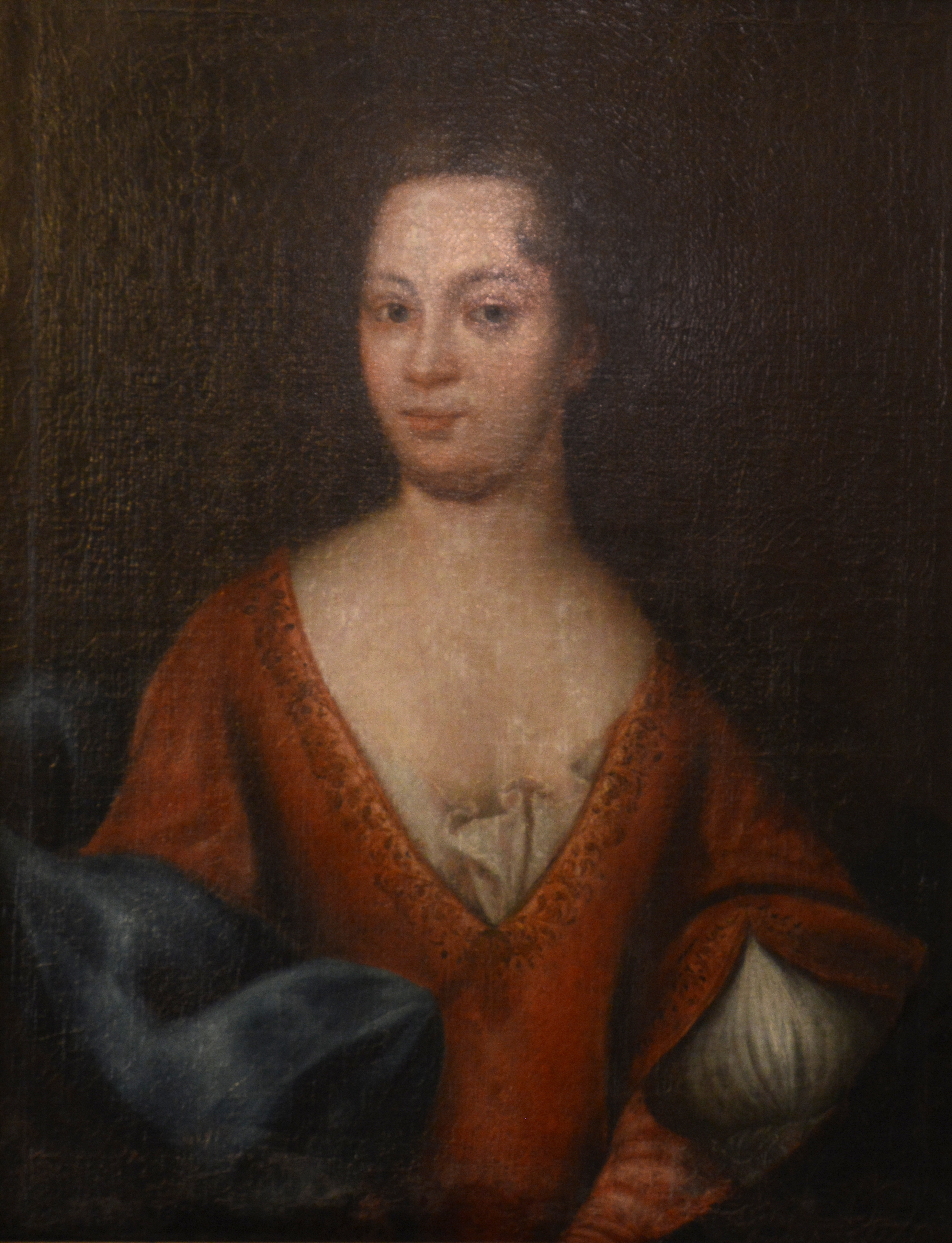 Anne Clausdatters portrett på Borgestad gård